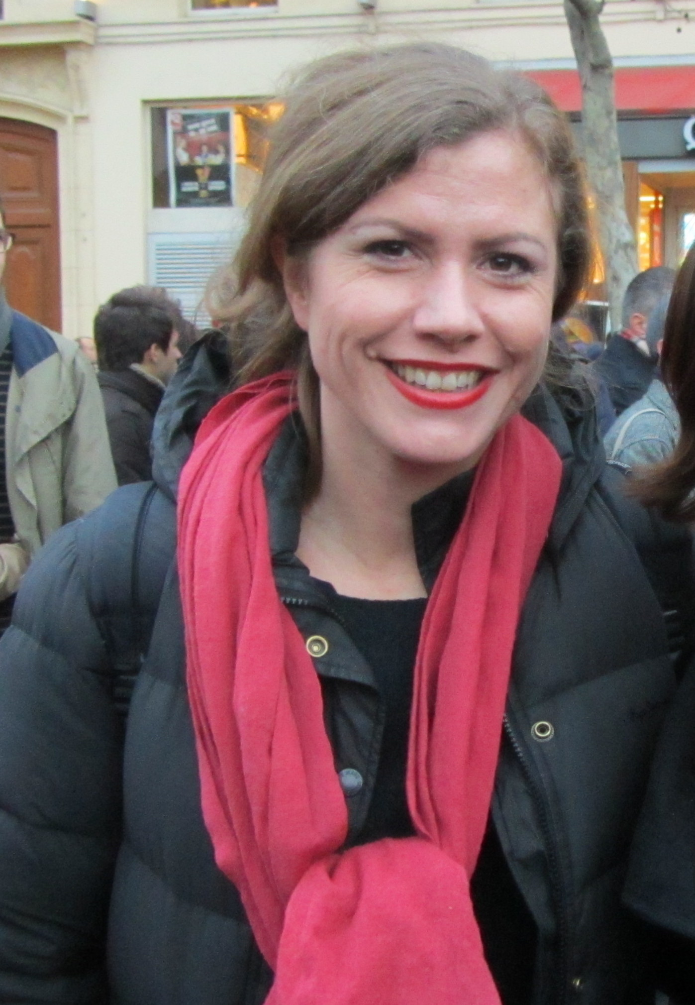 Océane Michel (Oshen) à la manifestation en soutien du projet de loi ouvrant le mariage aux couples de personnes de même sexe dit mariage pour tous, Paris, 16 décembre 2012